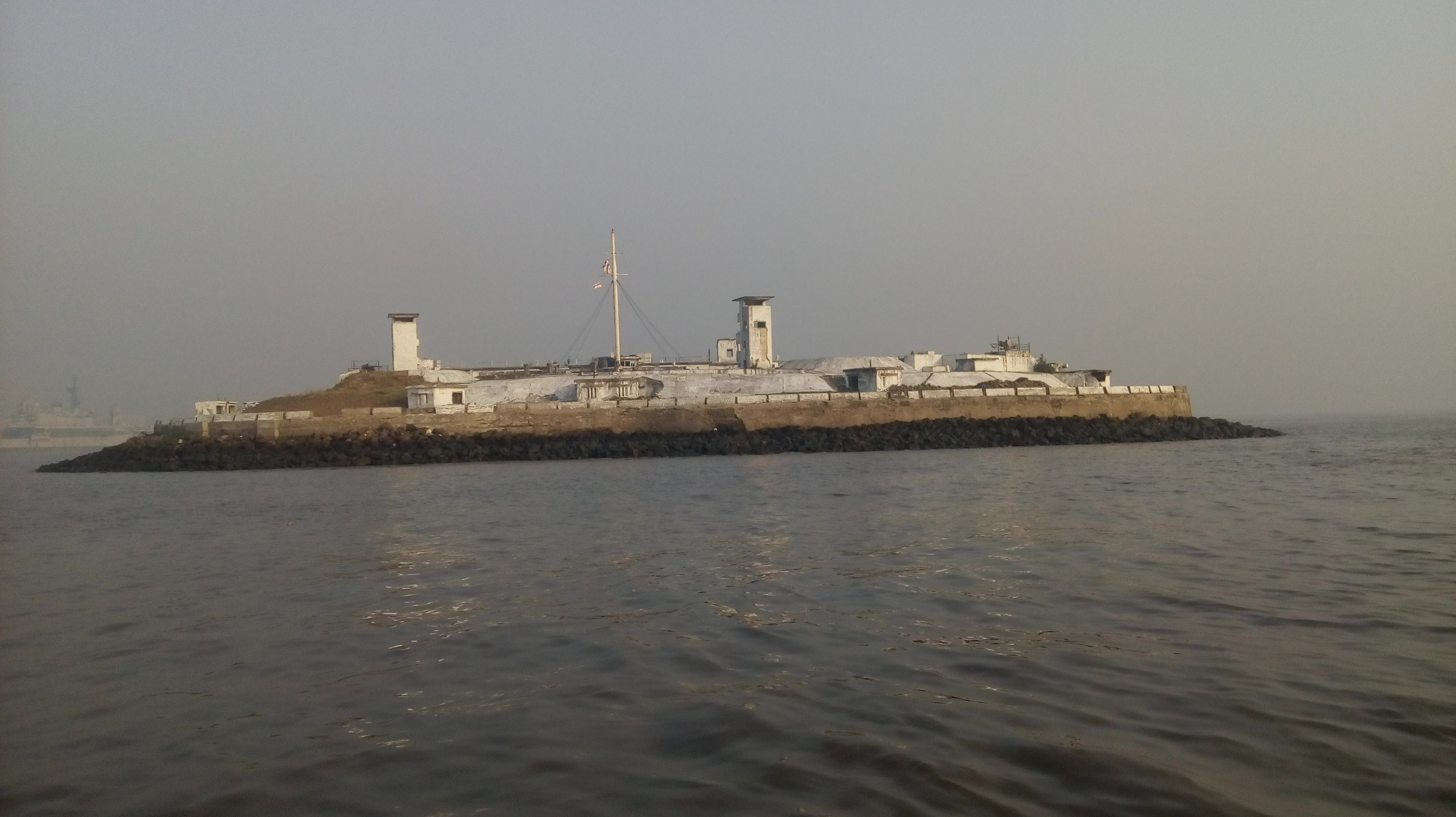 एलिफन्टा कॅव्हेस छायाचित्रे